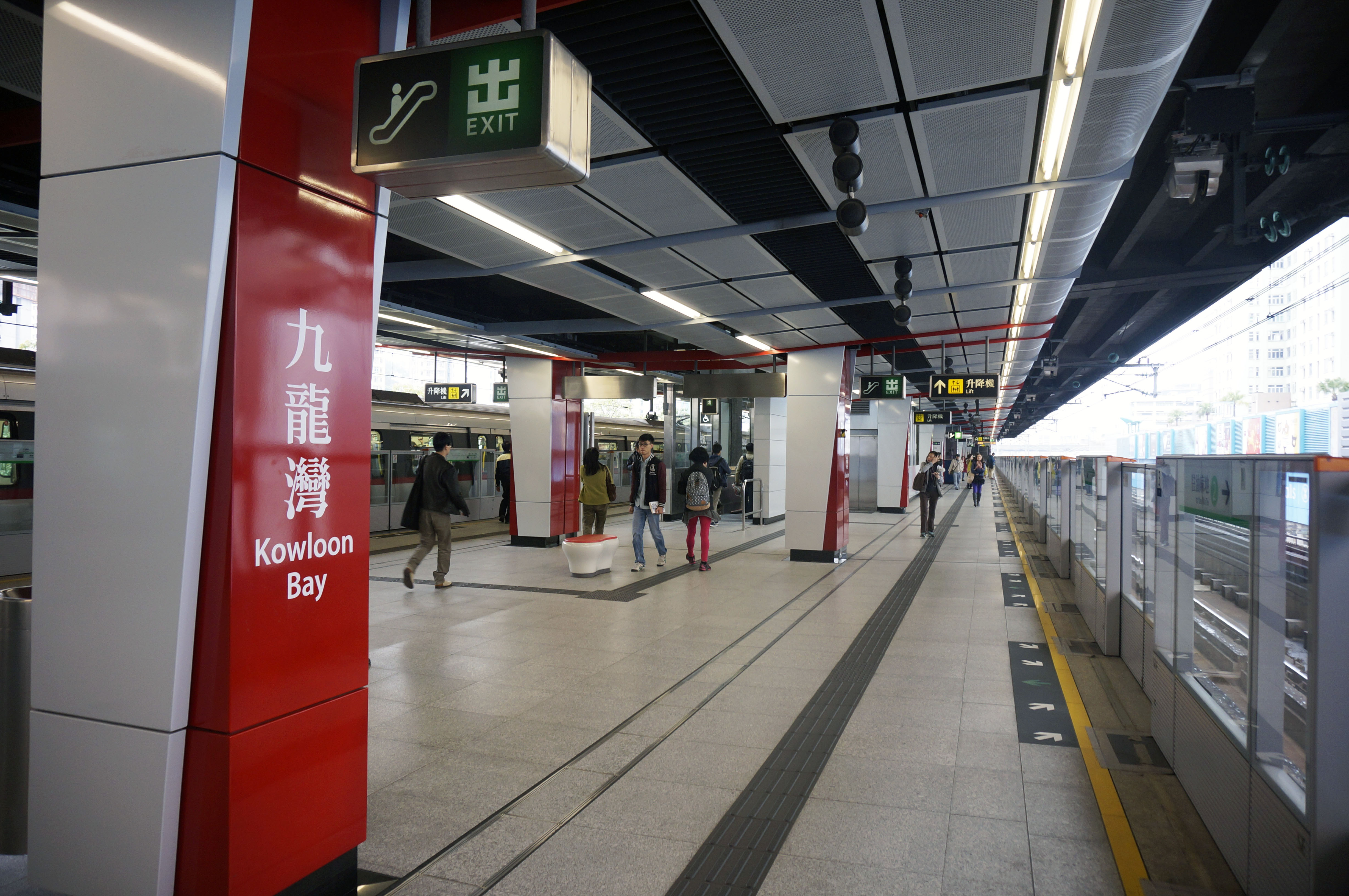 港鐵九龍灣站月台